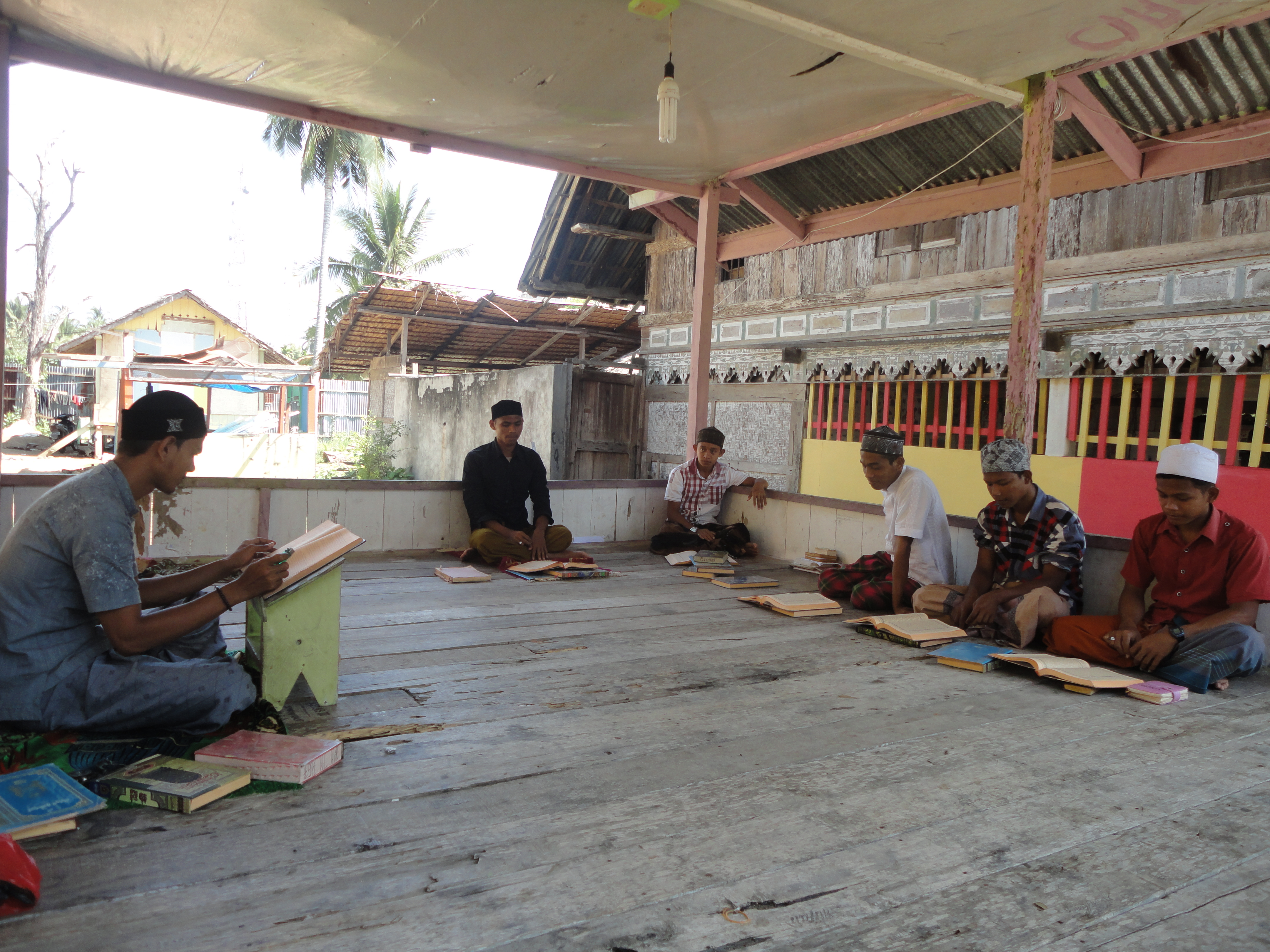 Suasana belajar mengajar